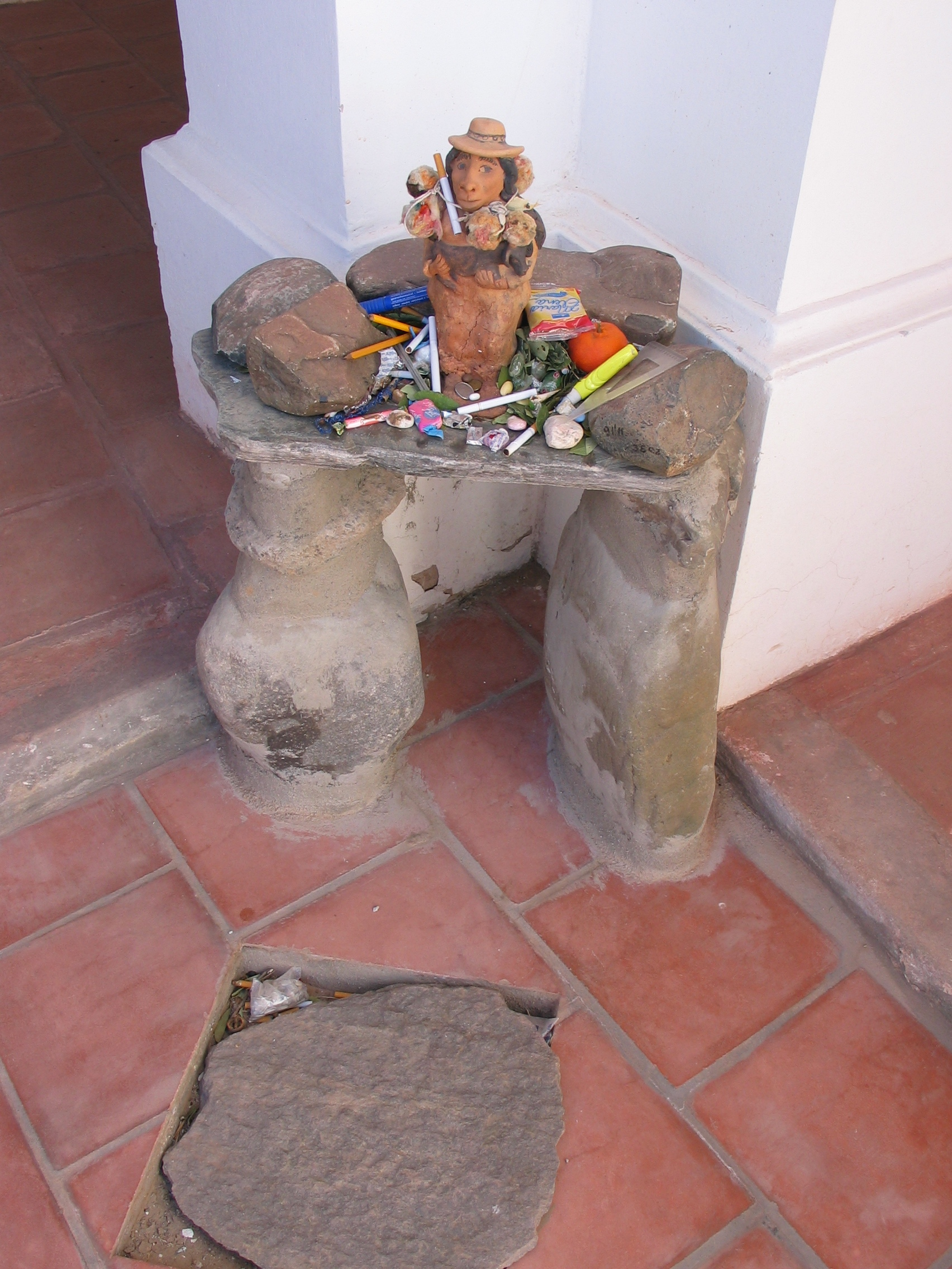 Figur der Pacha Mama mit Opfergaben